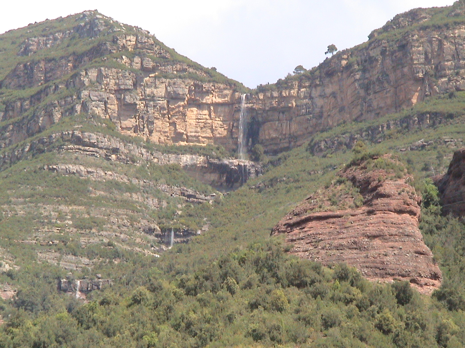 El salt del Torrent del Gat (Riells del Fai, Bigues i Riells, Vallès Oriental)